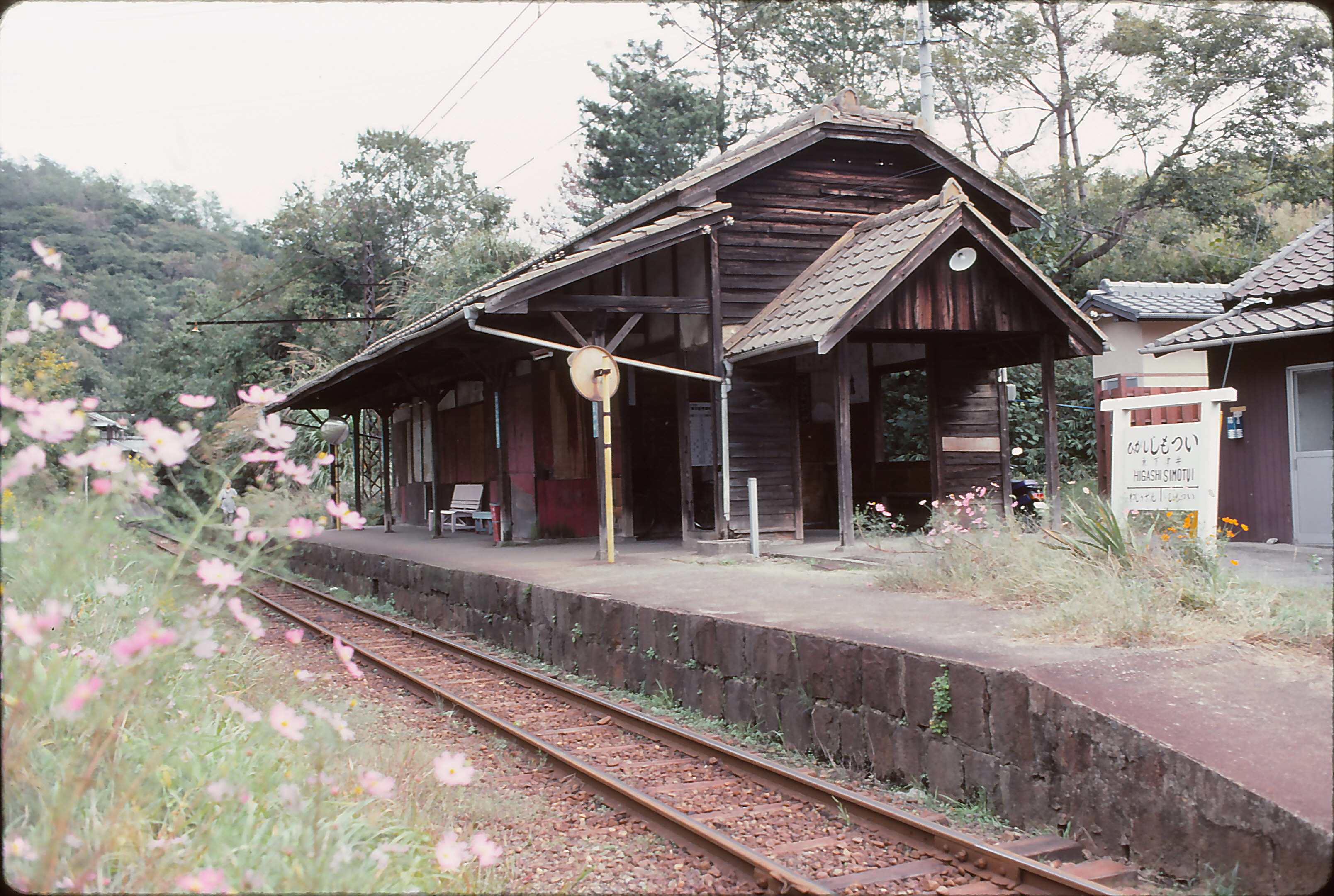 下津井電鉄 東下津井駅